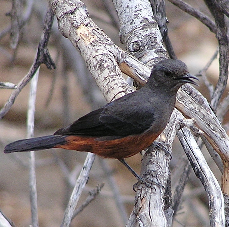 Mocking chat Thamnolaea cinnamomeiventris, Pilanesberg NP, SÃ¼dafrika